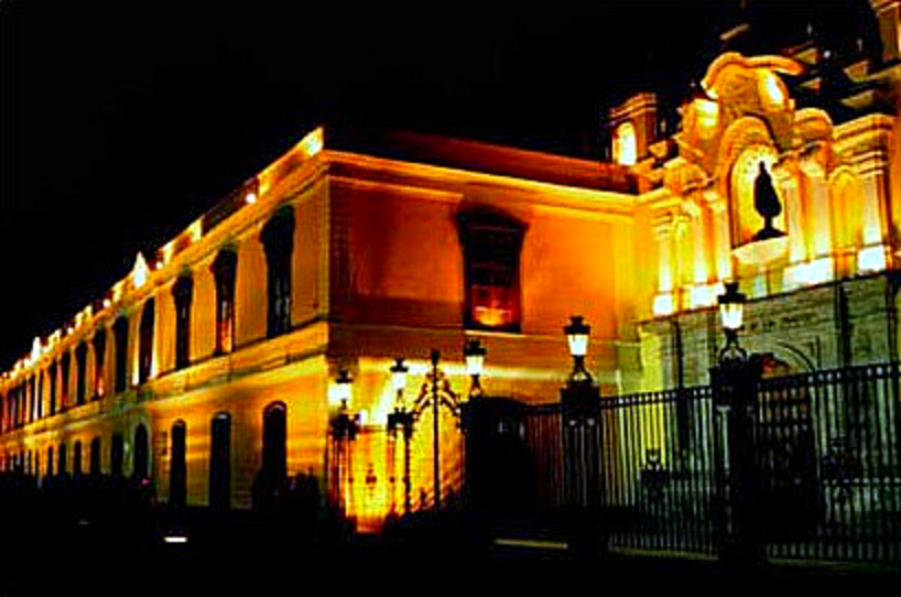 Casona historica de la Universidad Nacional Mayor de San Marcos, Lima, Peru.